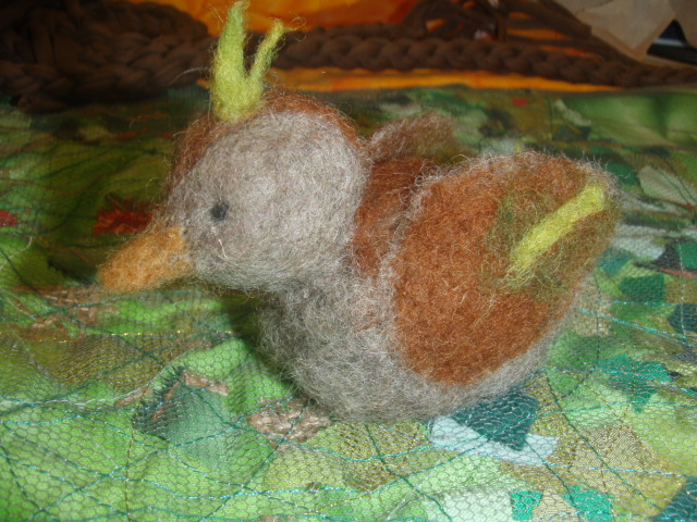 Neulahuovutettu lintunen